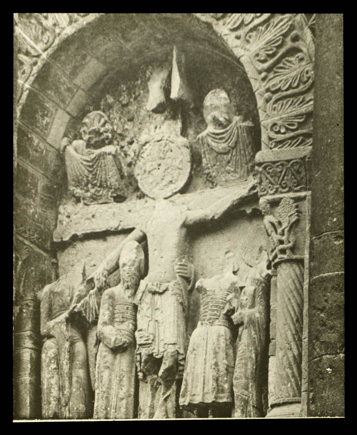 Église Saint-Hilaire de Foussais-Payré, façade ouest, sculpture signée par Girard Audebert de St Jean d'Angély. Planche 1061 dans le tome 7 de Romanesque sculpture of the pilgrimage roads de Arthur K. Porter.